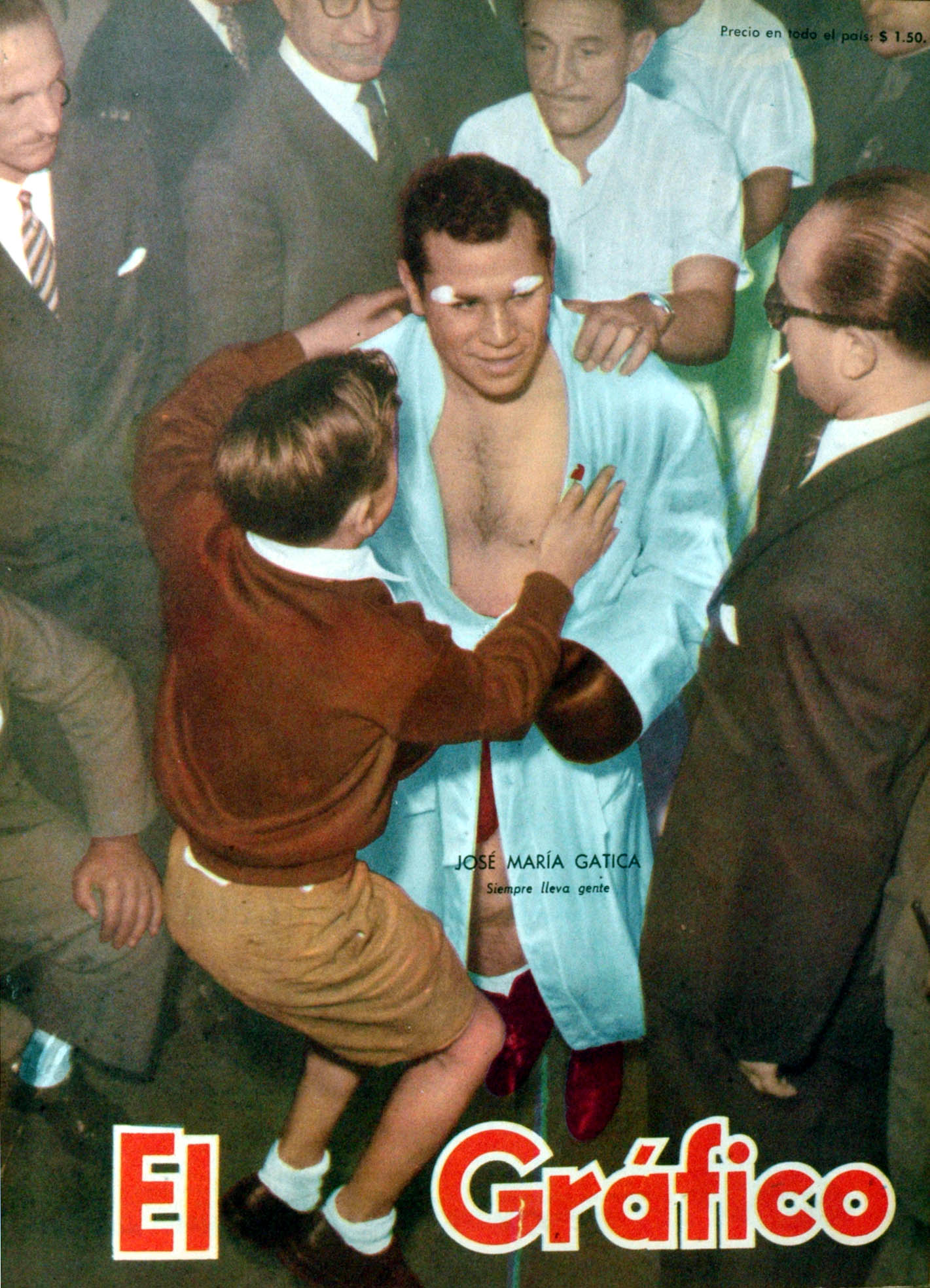 El Grafico del 14 de Mayo de 1954. Edicion 1814